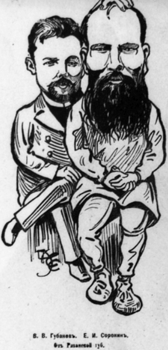 Депутаты Государственной Думы В. В. [то есть В. Г.] Губанов, Е. И. Сорокин